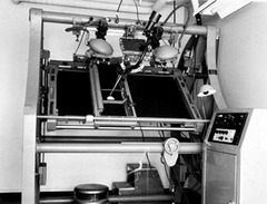 Model d'ortofotoscopi amb el que es van elaborar els primers ortofotomapes